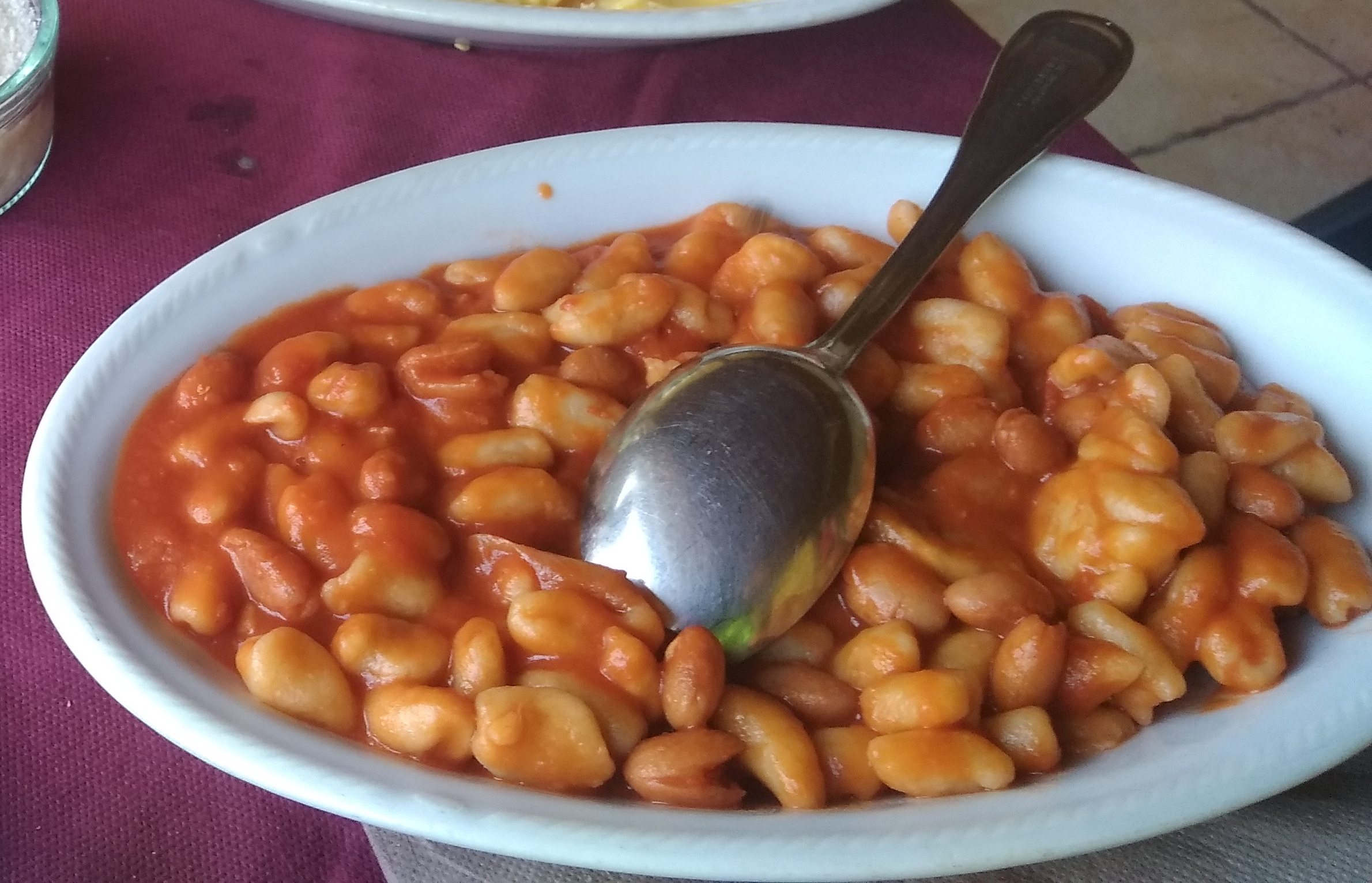 Un piatto di Pisarei e Fasò, piatto tipico piacentino: Gnocchetti con sugo di fagioli